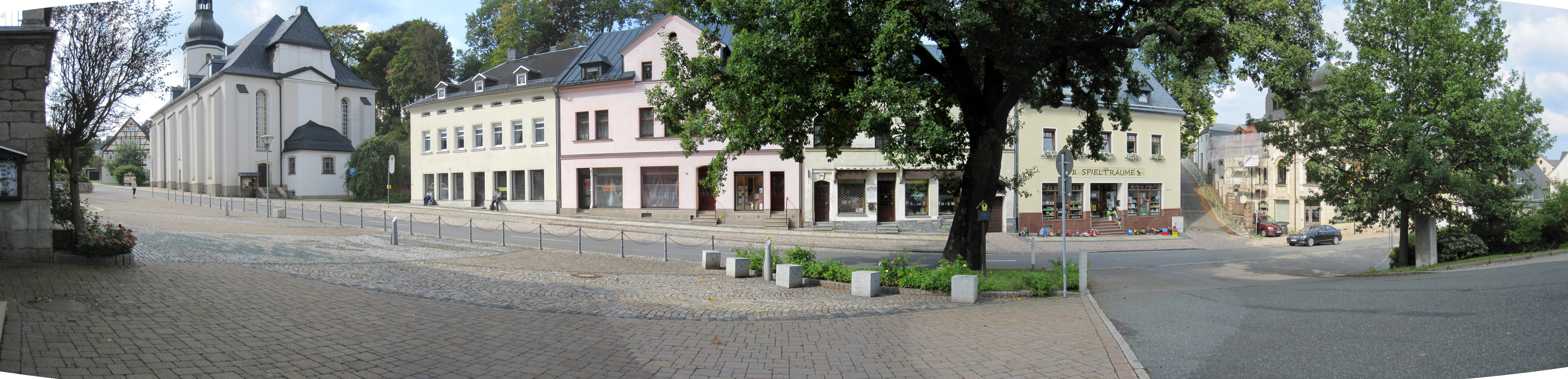 Schönheide im Erzgebirge: Zu Panoramen zusammengesetzte Fotos zeigen die stadtähnliche Bebauung des Dorfes, die im Zuge der Industrialisierung und dem damit verbundenen Bevölkerungszuwachs entstand.